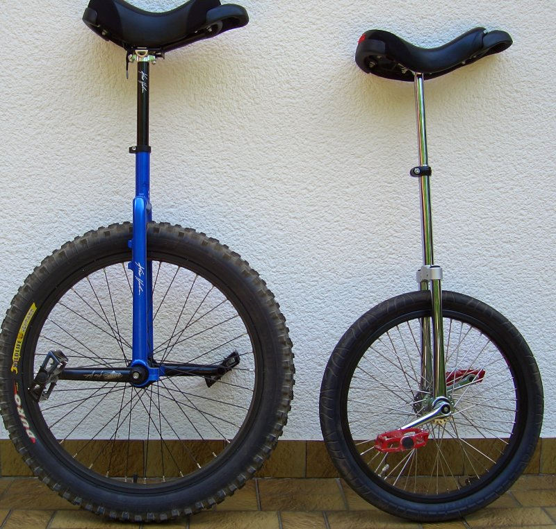 24 Zoll Municycle verglichen mit 20 Zoll Standard-Einrad